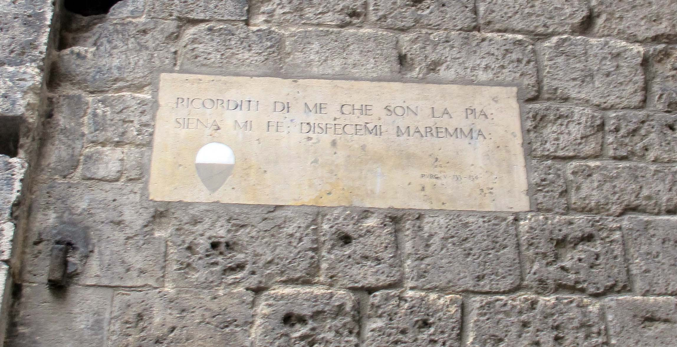 Banchi di Sotto e dintorni, Siena